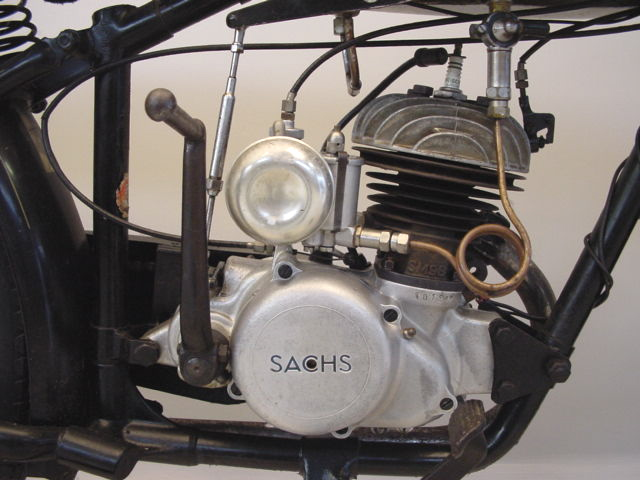 Sachs 98 cc twataktmotor út 1936.